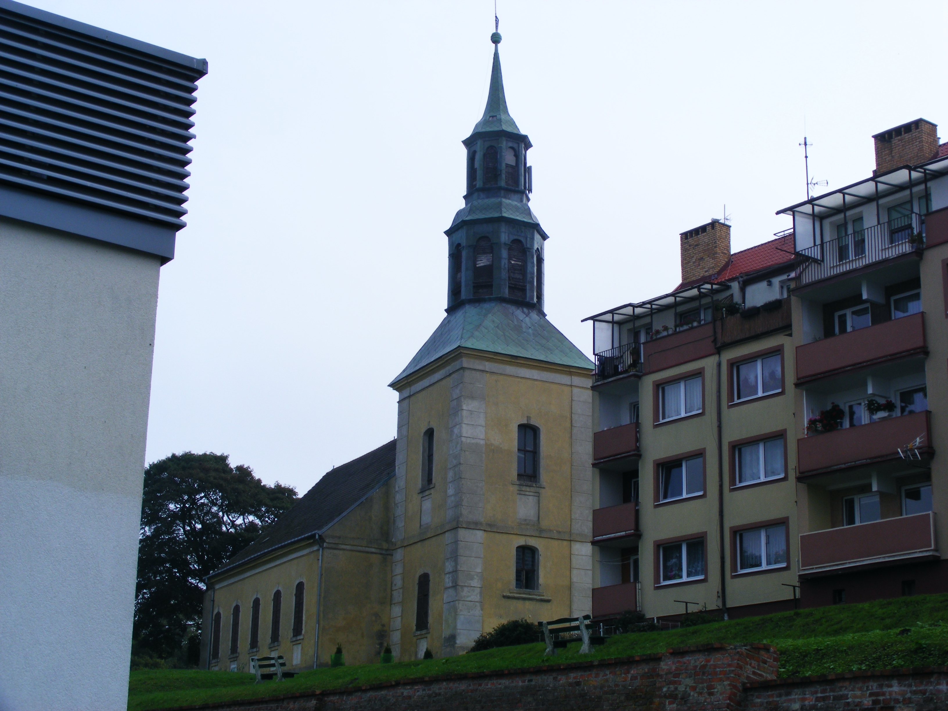 Kościół Wniebowzięcia Najświętszej Maryi Panny w Kamieniu Pomorskim.